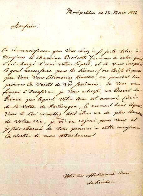 Brief von Steubens aus Montpellier, Frankreichreise als Hofmarschall des Fürsten von Hohenzollern-Hechingen 1773